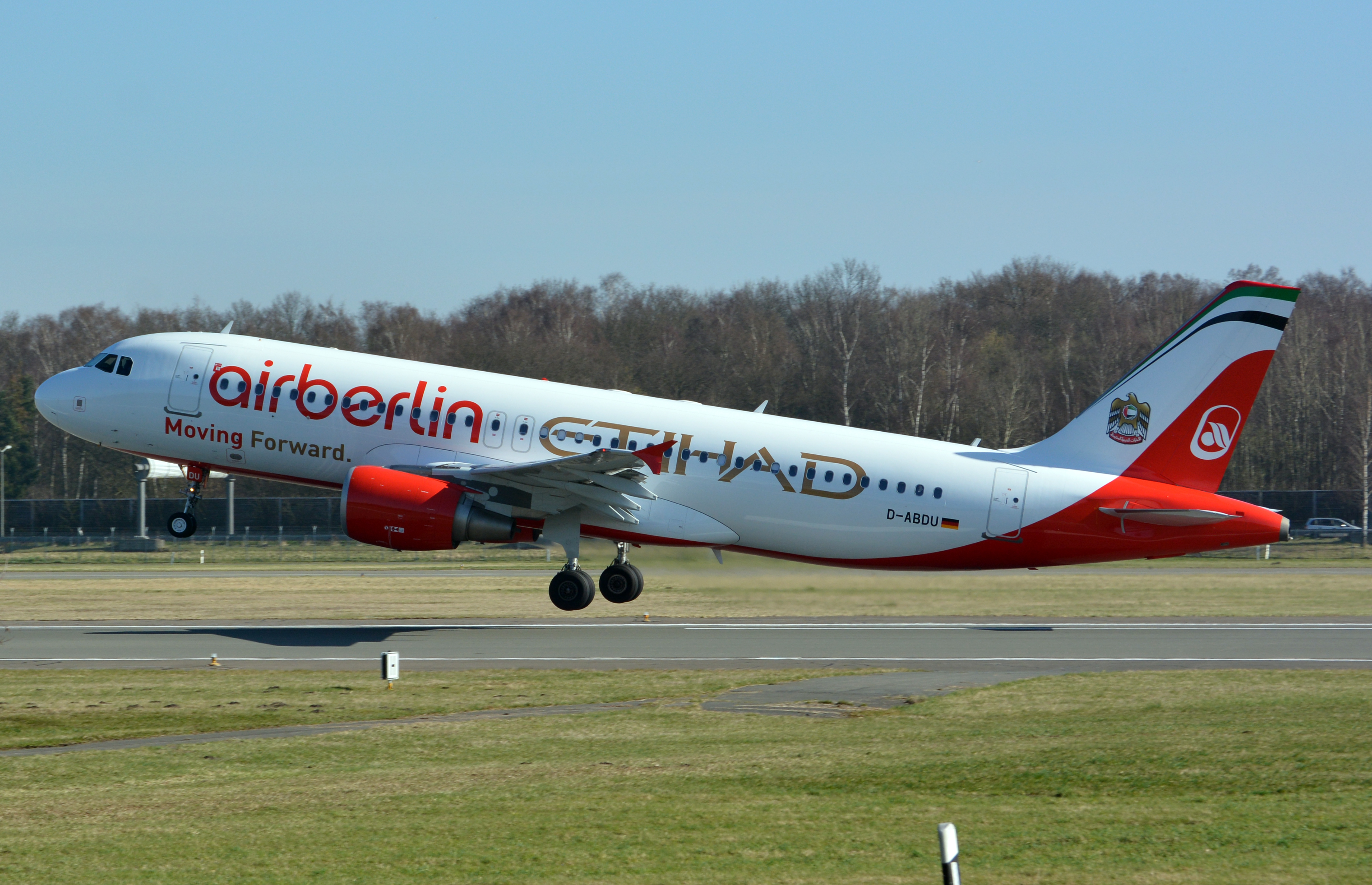 Airbus A320-214 (D-ABDU) auf dem Hamburg Airport